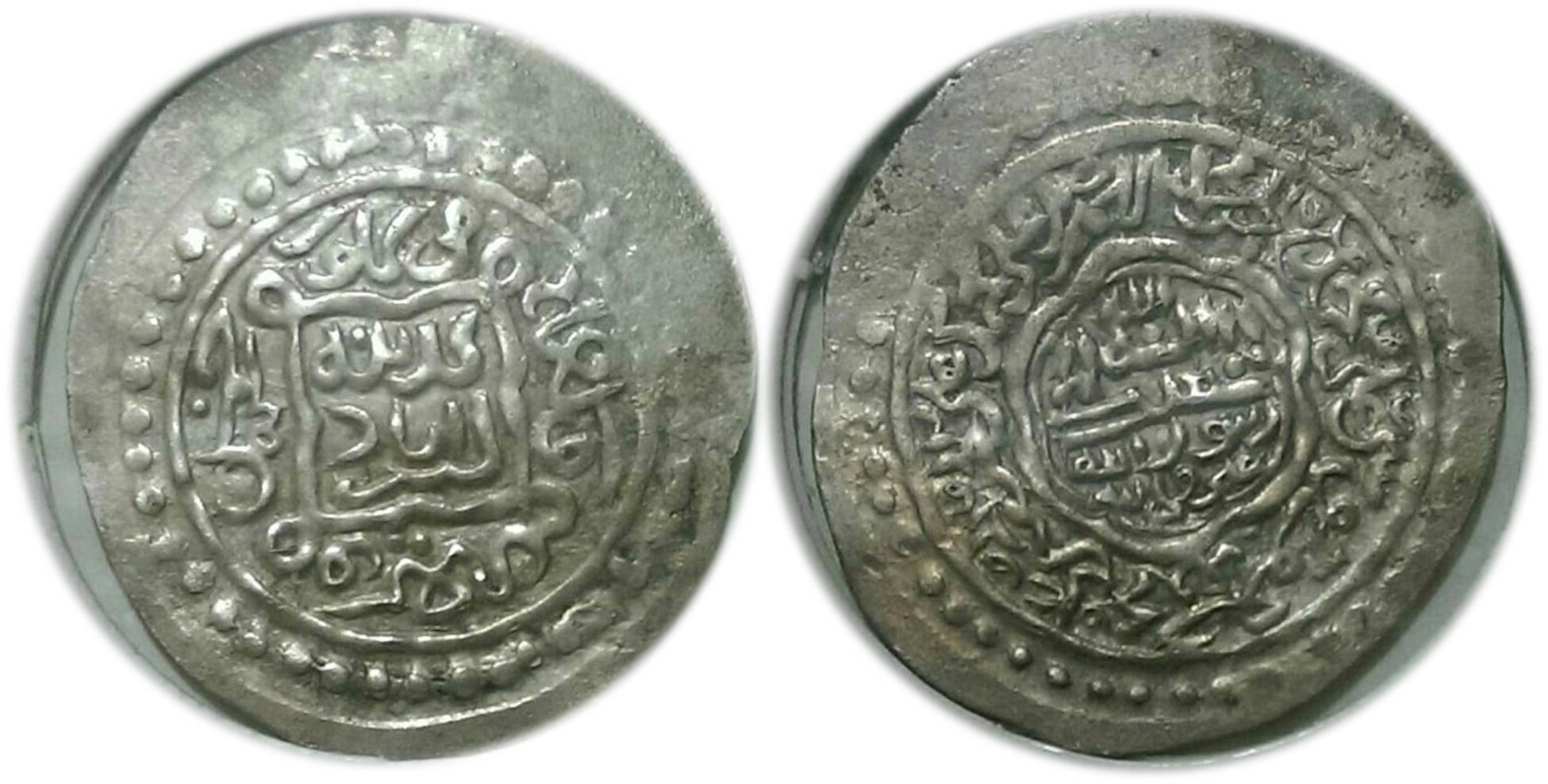 درهم نقره علی مؤید سربدار ضرب 775 قمری